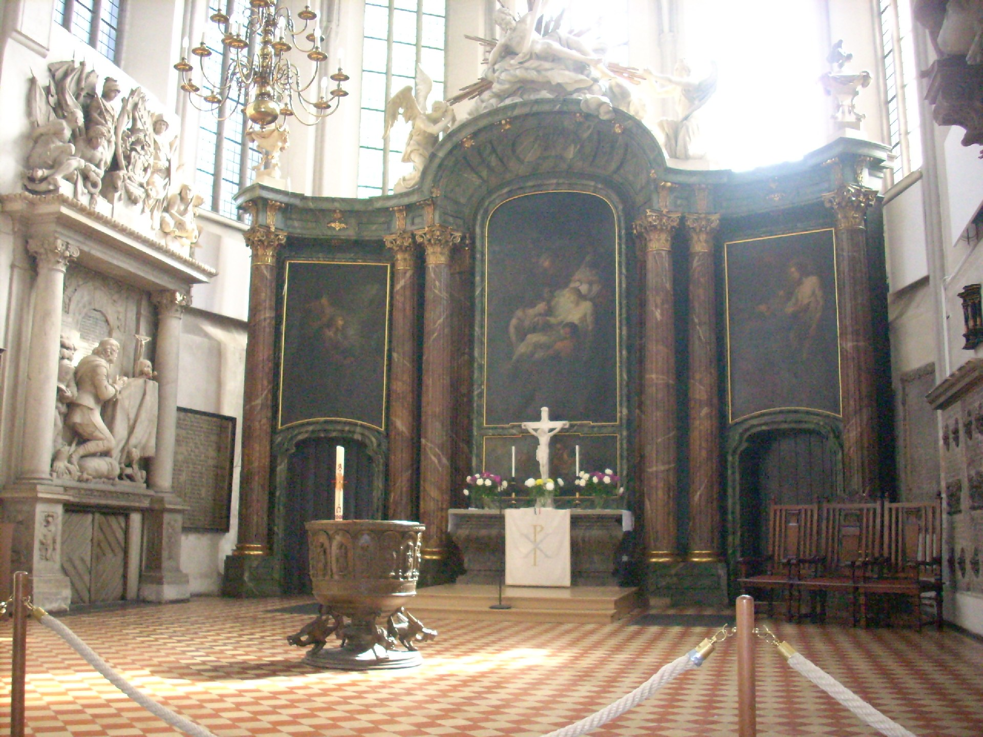 Berlin-Mitte, Marienkirche, Altar und Taufbecken. Links an der Wand das Grabmal des Feldmárschalls Otto Christoph von Sparr geschaffen 1663 von Artus Quellinus I. aus Antwerpen.